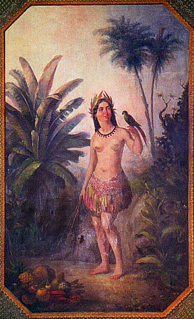 Painéis dos 4 Continentes no Palacete do Caminho Novo - América